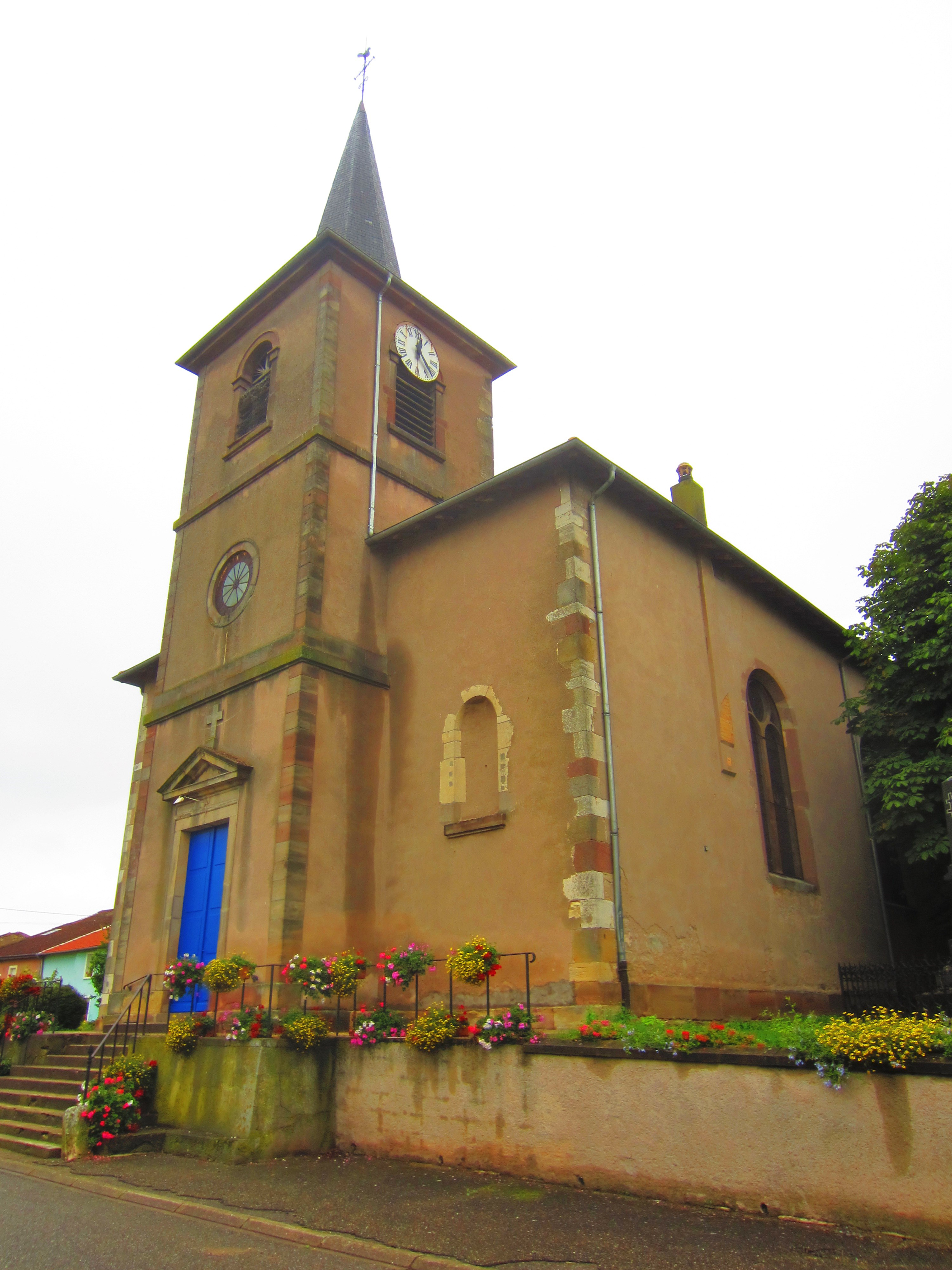 Eglise Mulcey